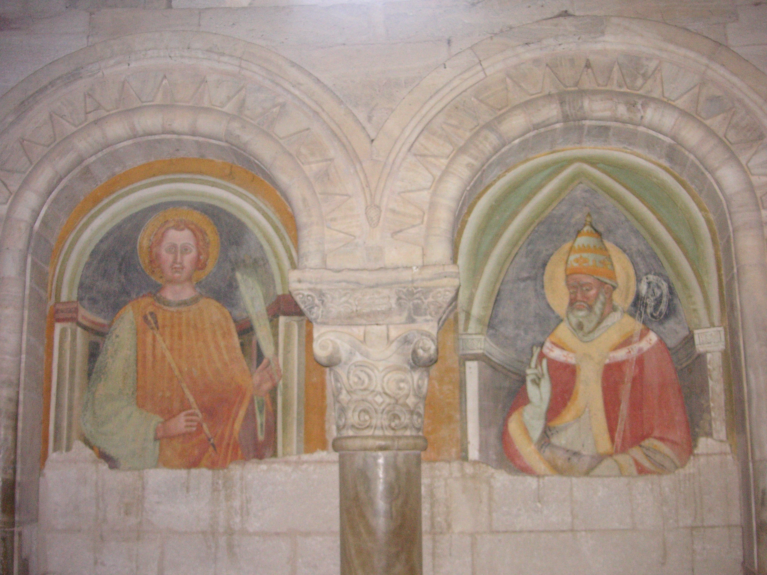 Affreschi all'interno dell'Abbazia di Sant'Antimo